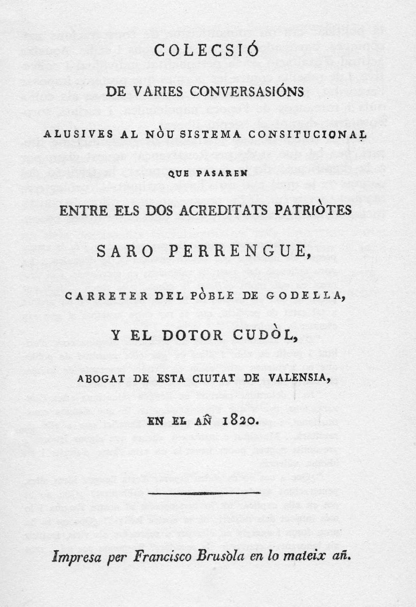 Portada de un libro en valenciano de 1820